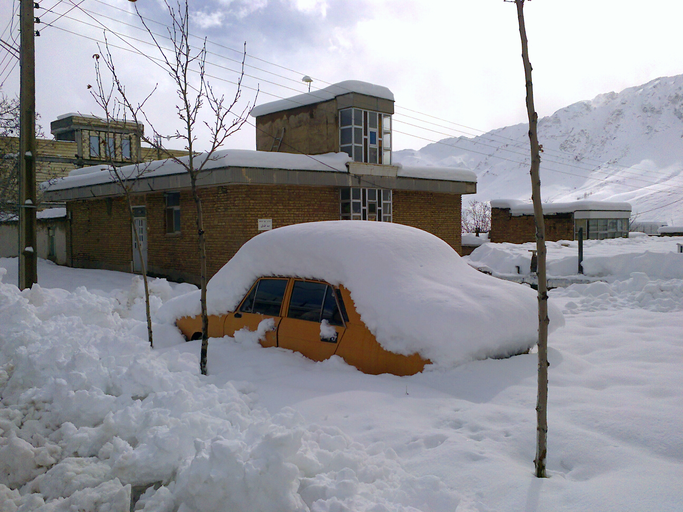 برف پاییزی فریدونشهر